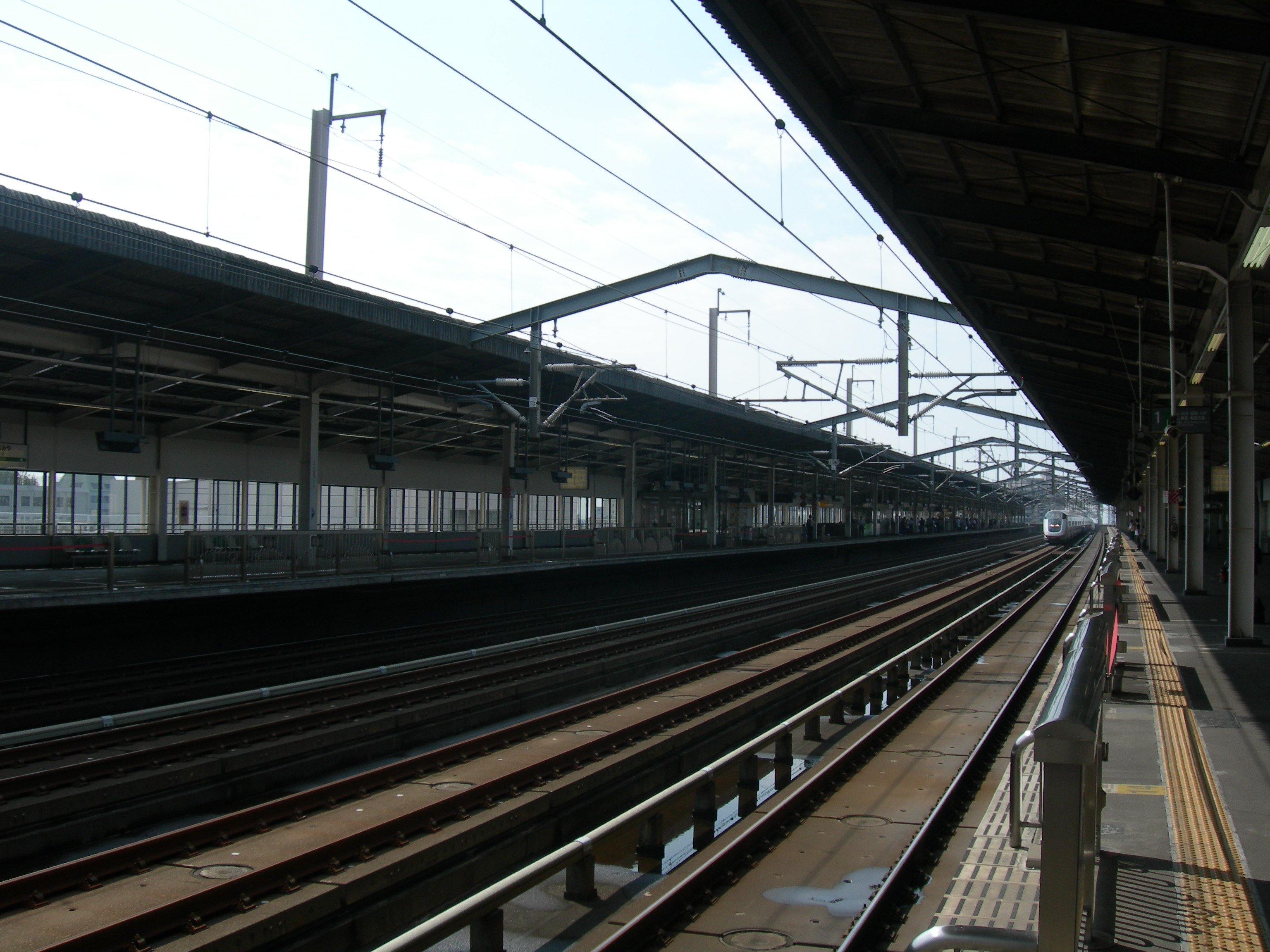 宇都宮駅新幹線ホーム